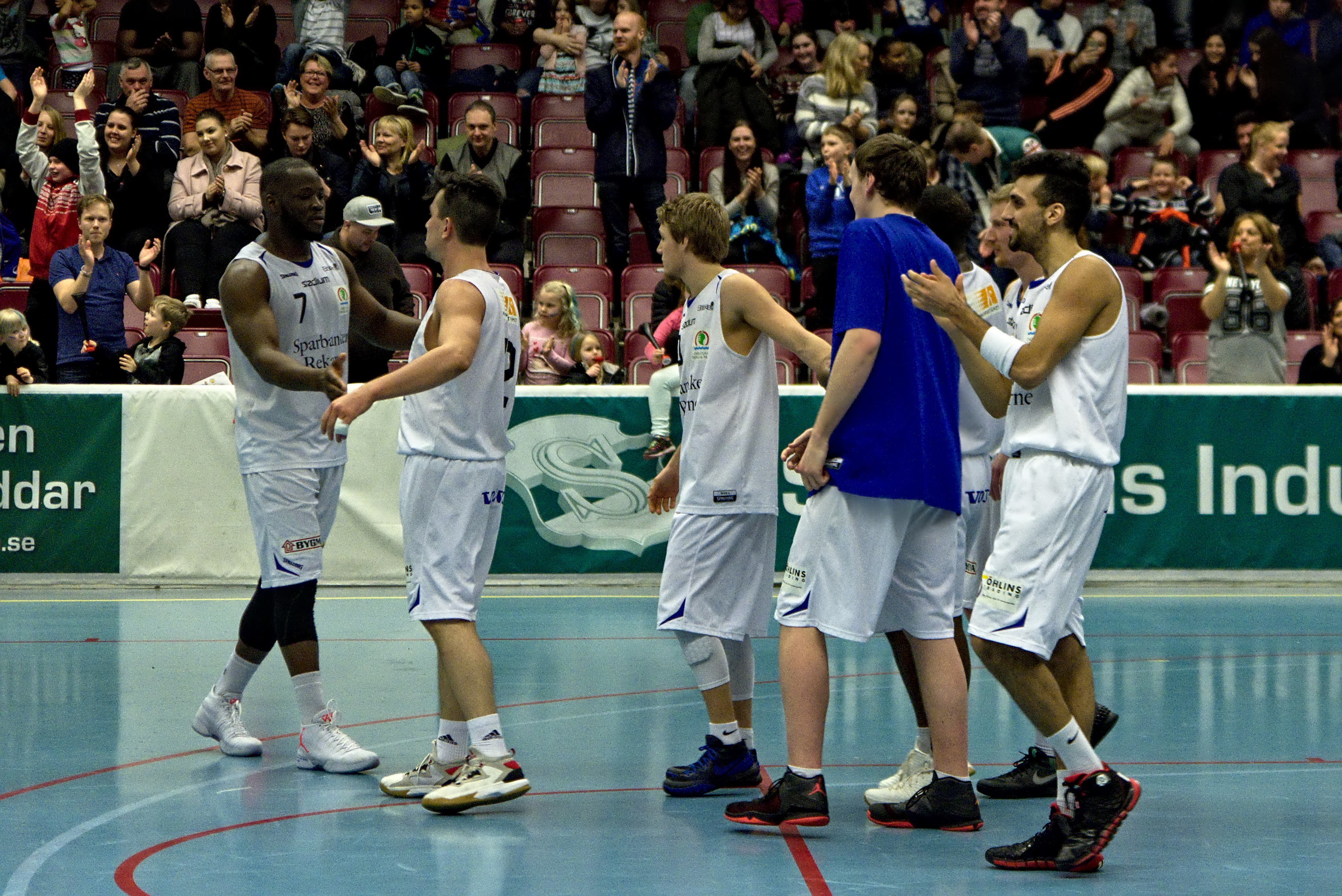 Eskilstuna Basket-KFUM Central, 2016-03-05 i Eskilstuna sporthall. Match i Basketettans fortsättningsserie Superettan.